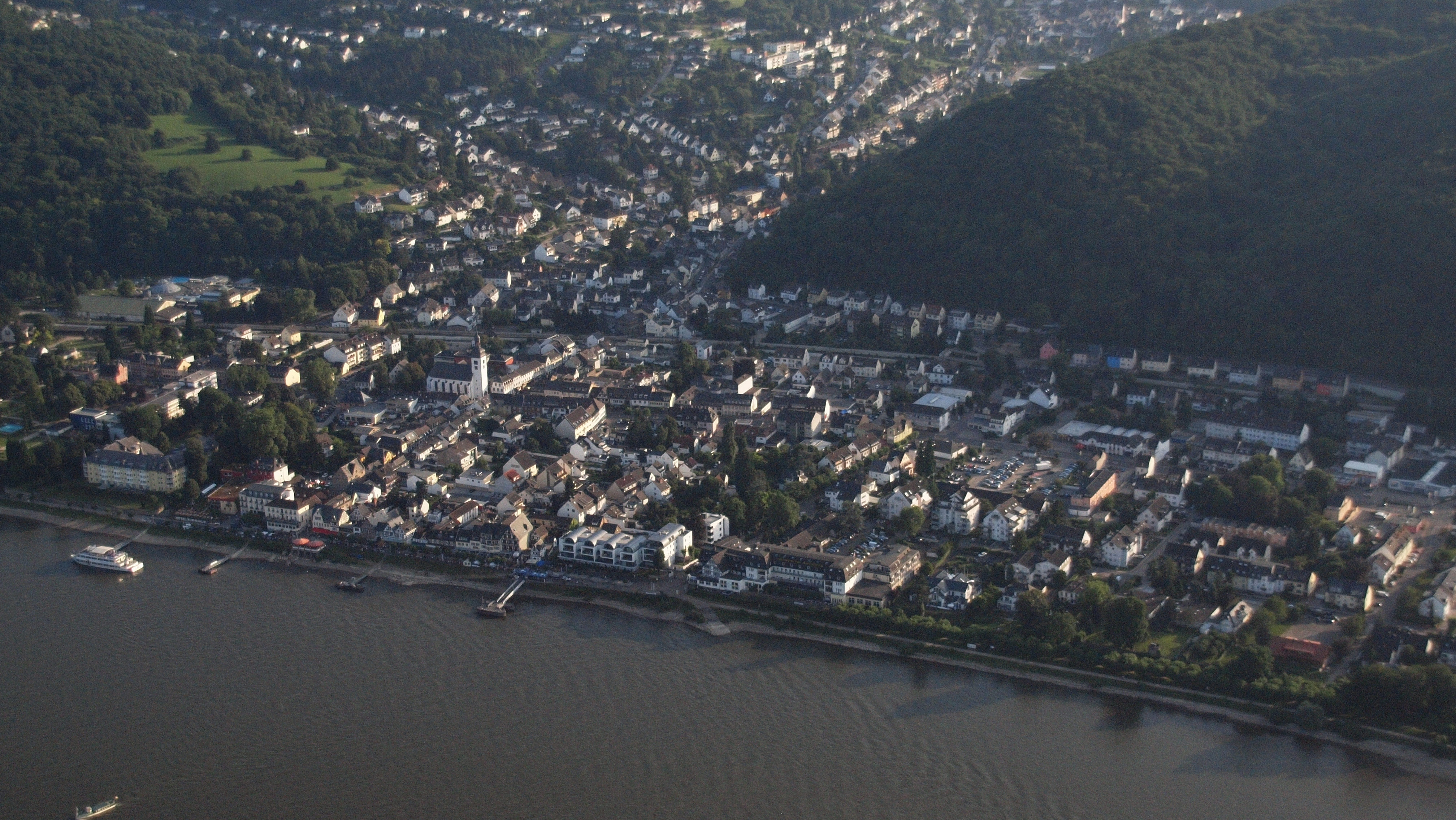 Bad Breisig, Luftaufnahme aus nordöstlicher Richtung